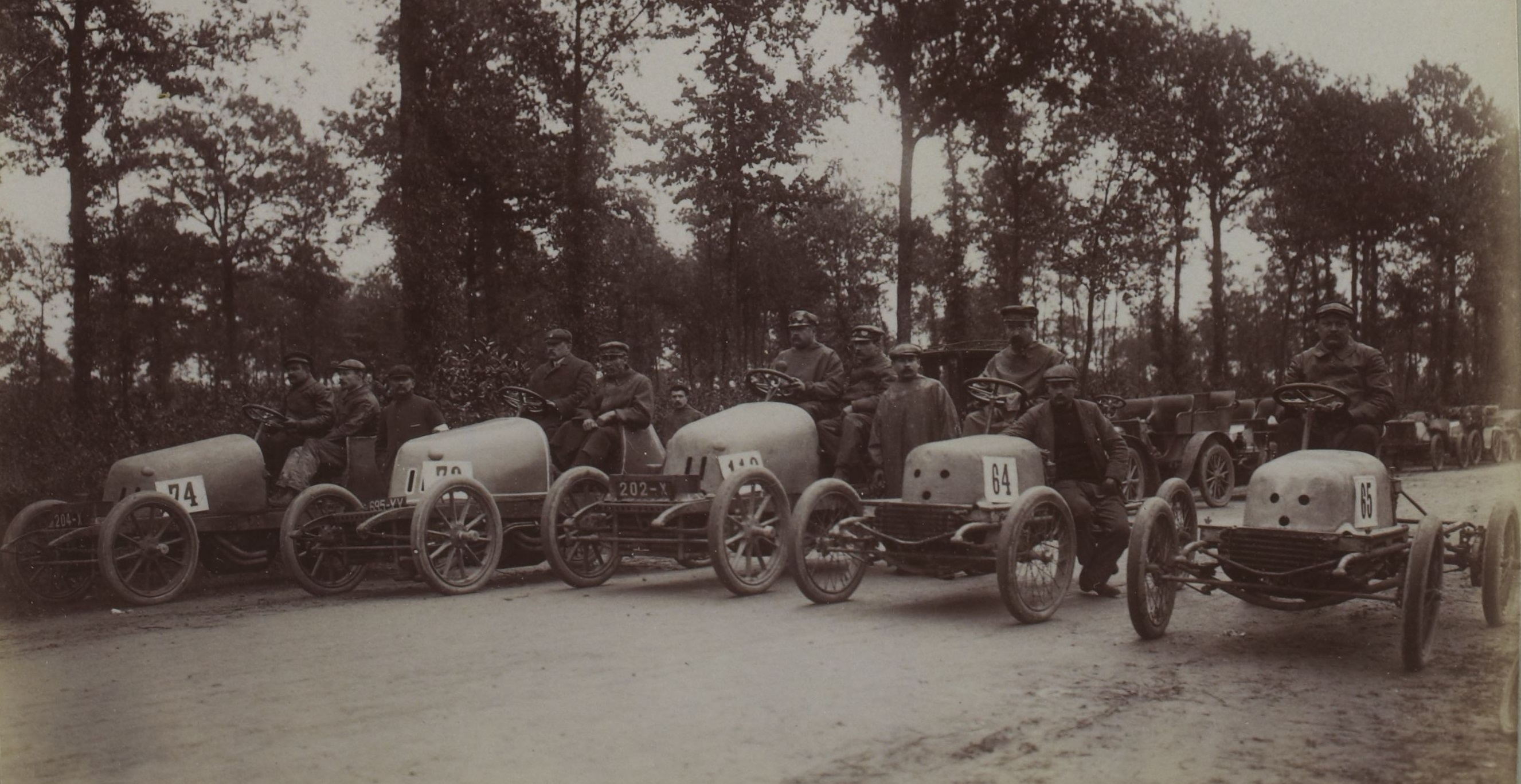 [Collection Jules Beau. Photographie sportive] : T. 23. AnnÃ©e 1903 / Jules Beau : F. 45v. [KilomÃ¨tre, Dourdan, 21 octobre 1903]